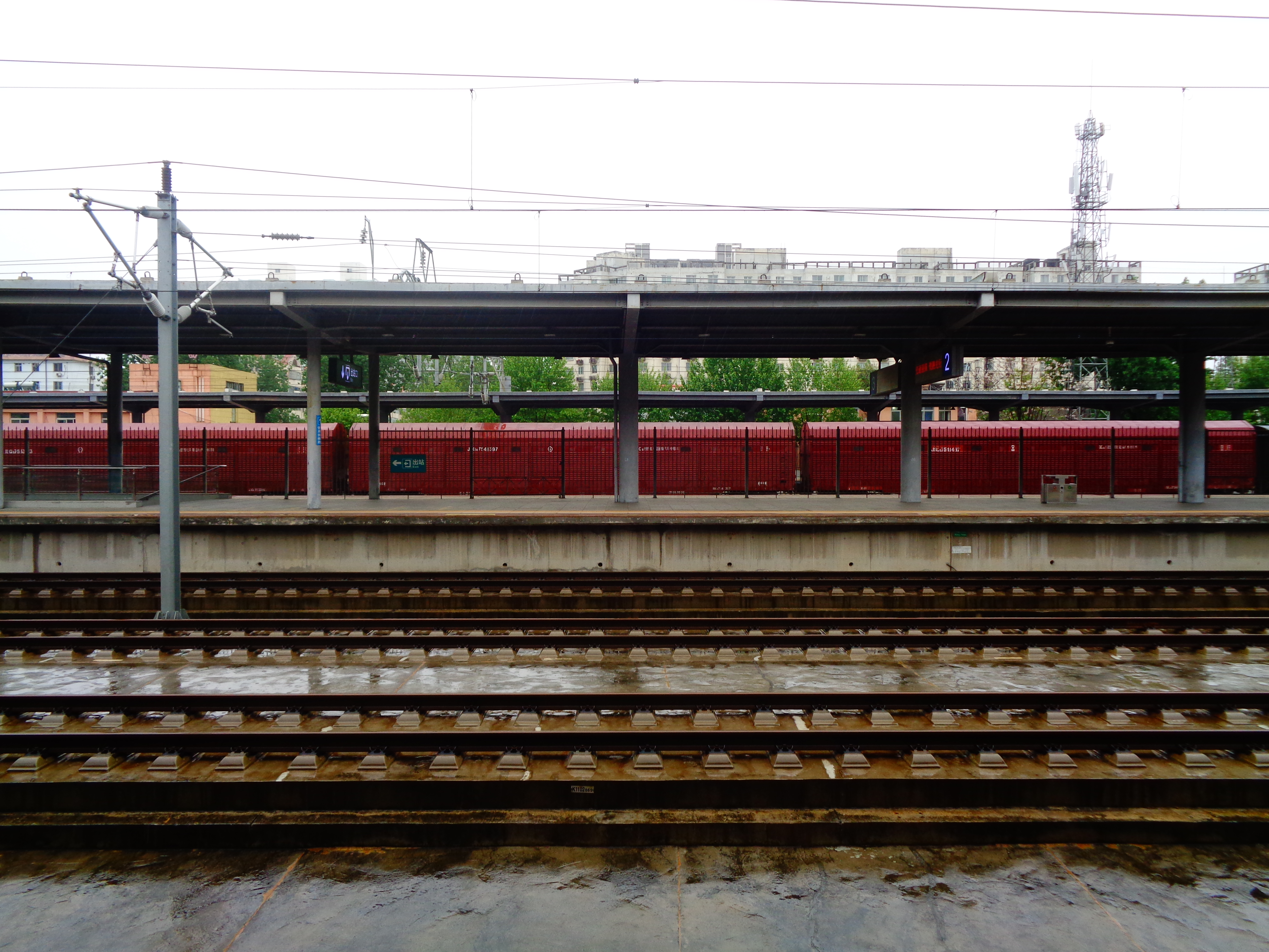 咸阳市秦都区咸阳秦都站月台